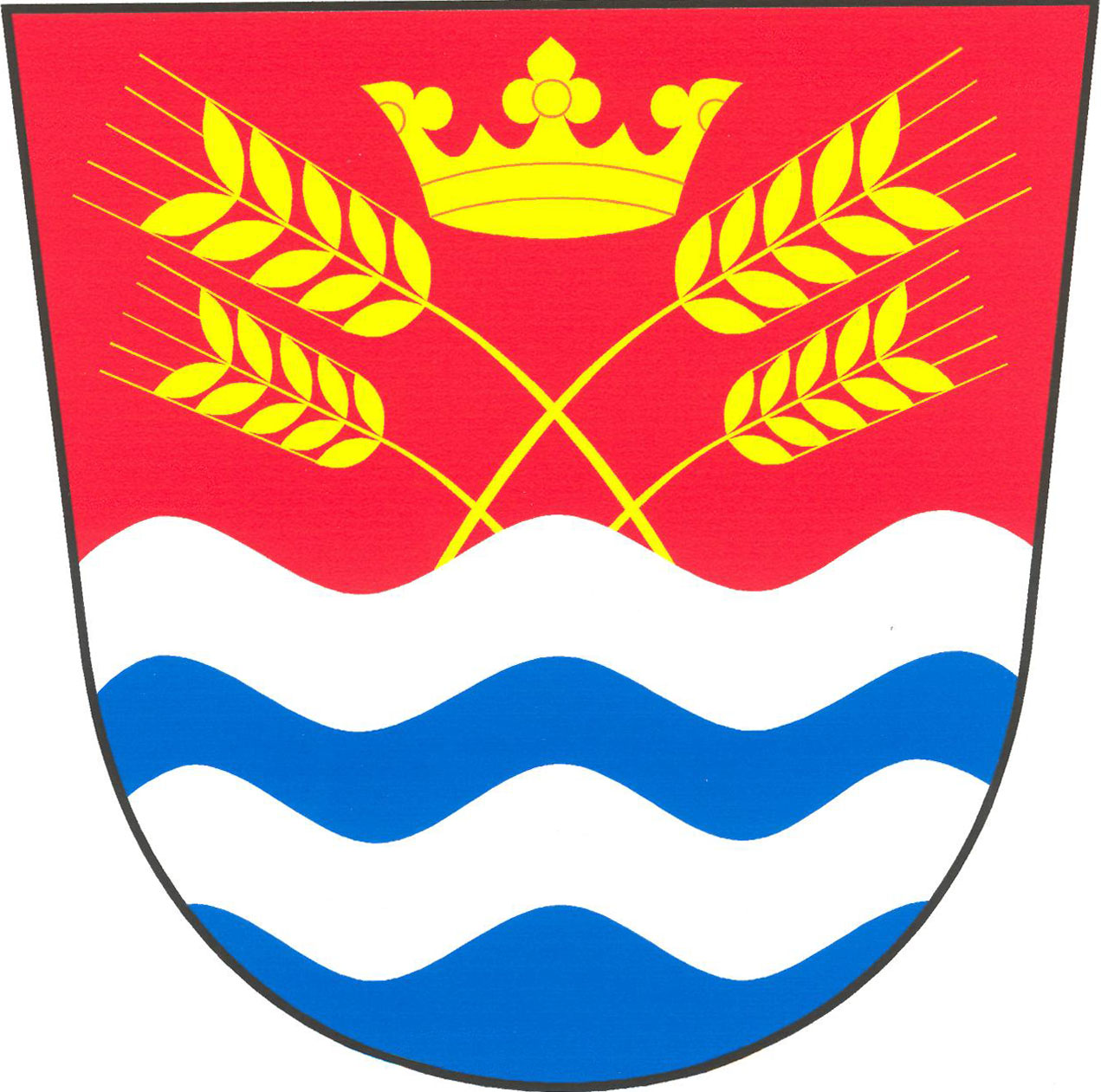 Znak obce Vejvanovice